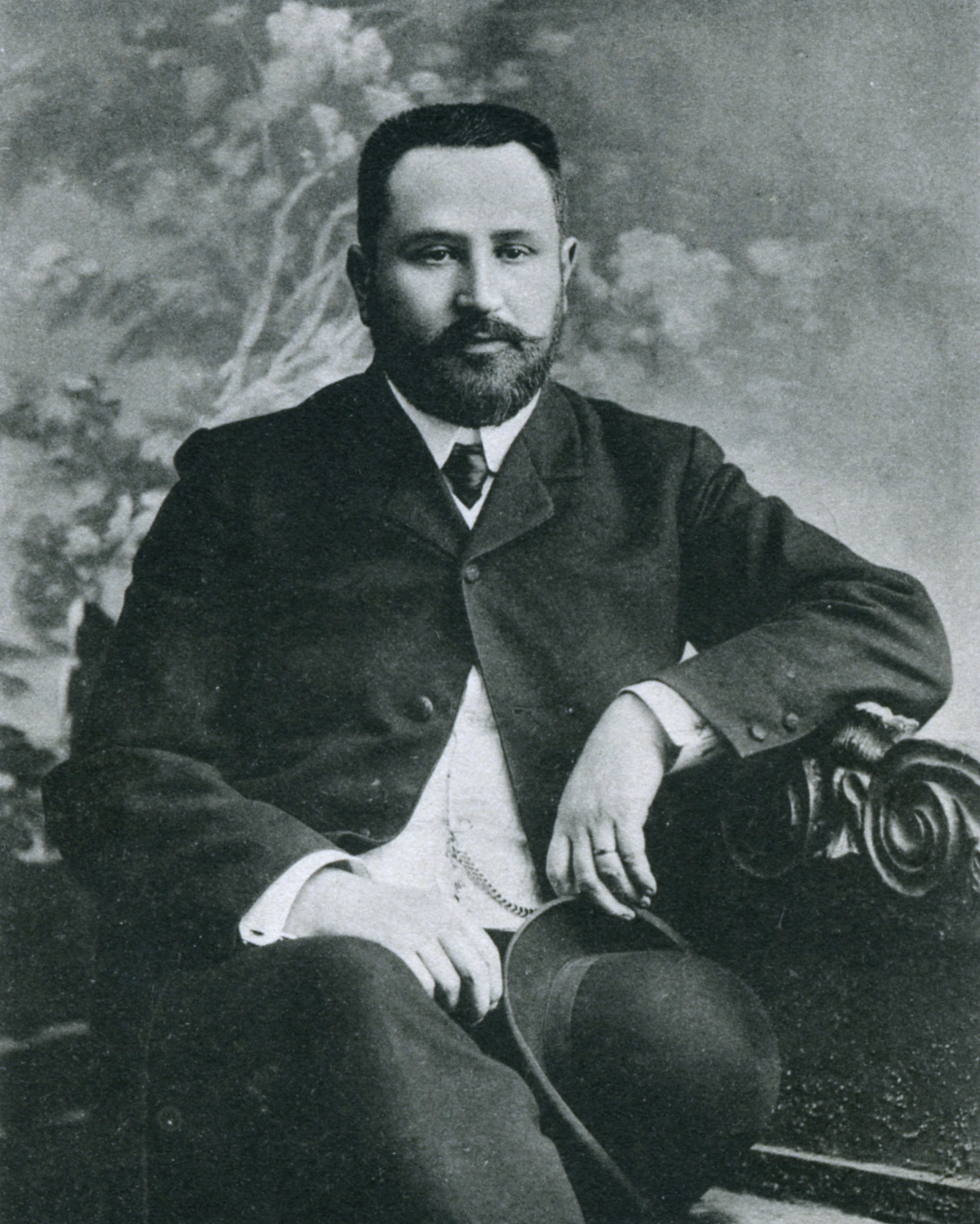 Ледницкий, Александр Робертович. Фото с почтовой открытки.